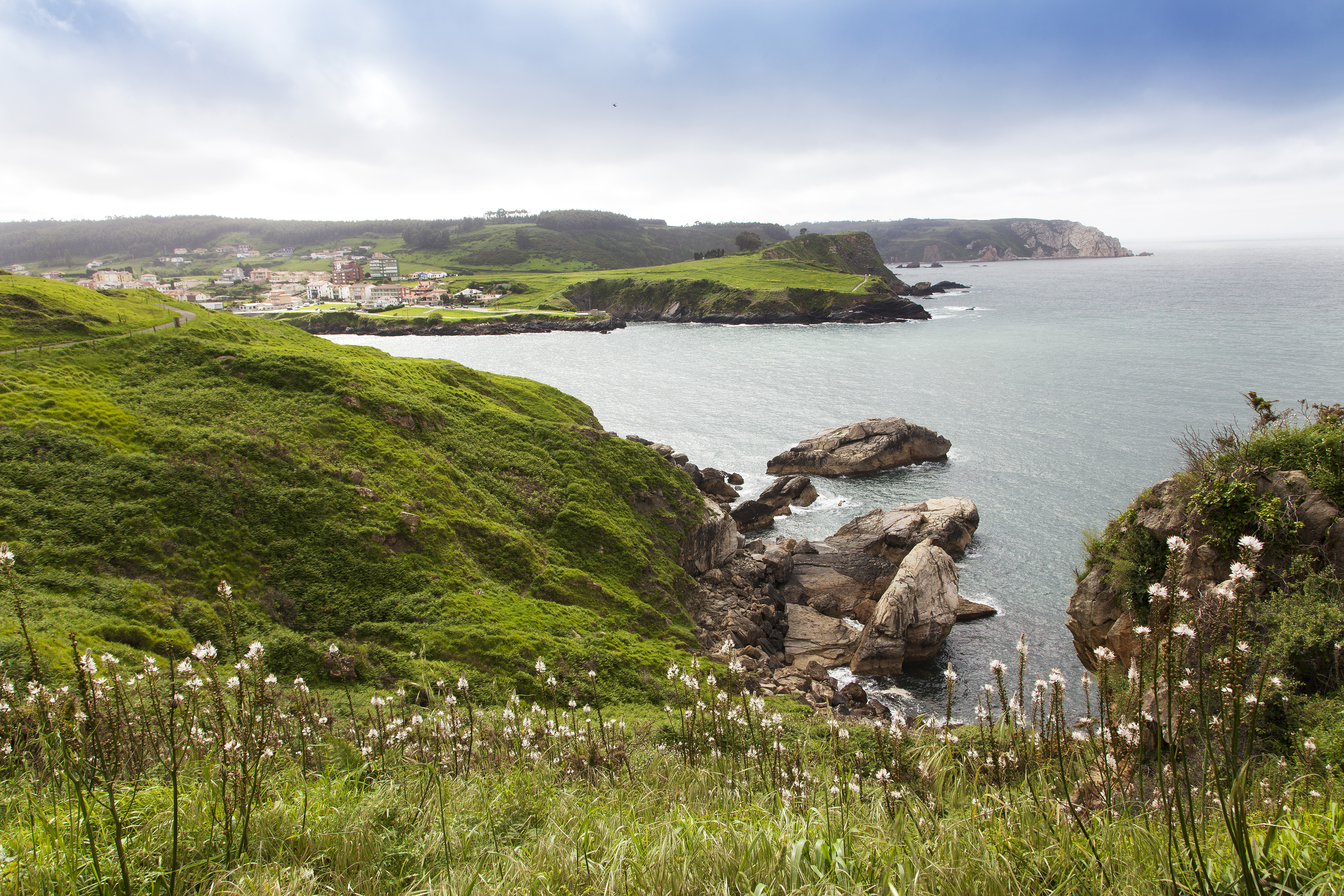 Senda costera de Arnao a Santa María del Mar, Castrillón, Asturias.